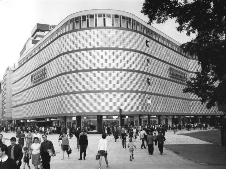 Leipzig, „Konsument“-Warenhaus Zentralbild Kluge 23.8.1968 Leipzig: Das „konsument“-Warenhaus am Leipziger Brühl öffnete am 22.8.1968 nach zweijähriger Bauzeit -es wurde in großem Umfang rekonstruiert und erweitert- wieder seine Pforten. In dem viergeschossigen Warenhaus, dem größten der DDR, ist das Warensortiment in sieben Bedarfskomplexe gegliedert nach modernsten Handelsmethoden auf einer Verkaufsfläche von 11000 qm zusammengestellt.